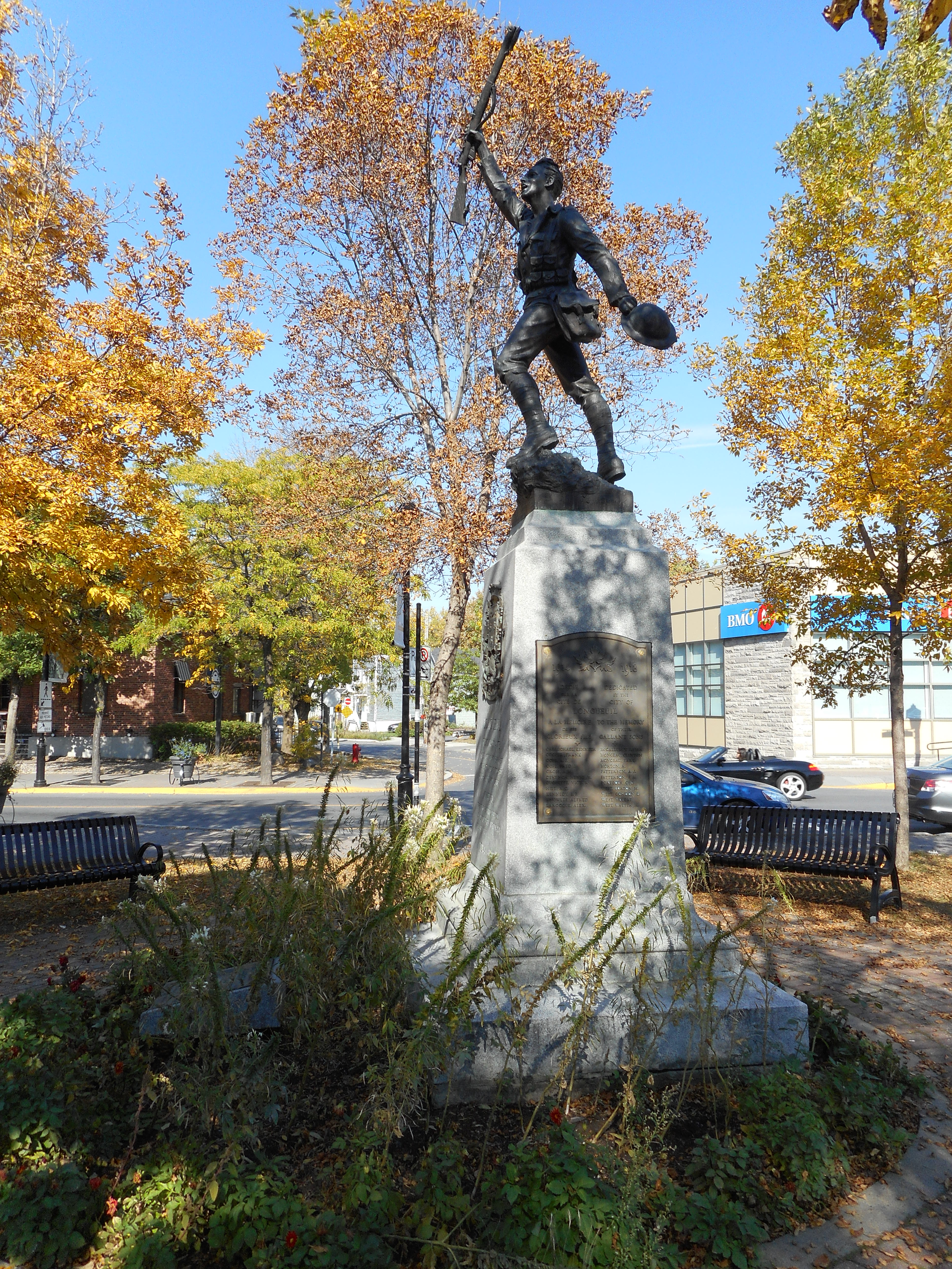 Le Monument aux Braves, situé depuis 1923 dans le parc Saint-Jean-Baptiste, à Longueuil, est l'oeuvre du sculpteur Émile Brunet.